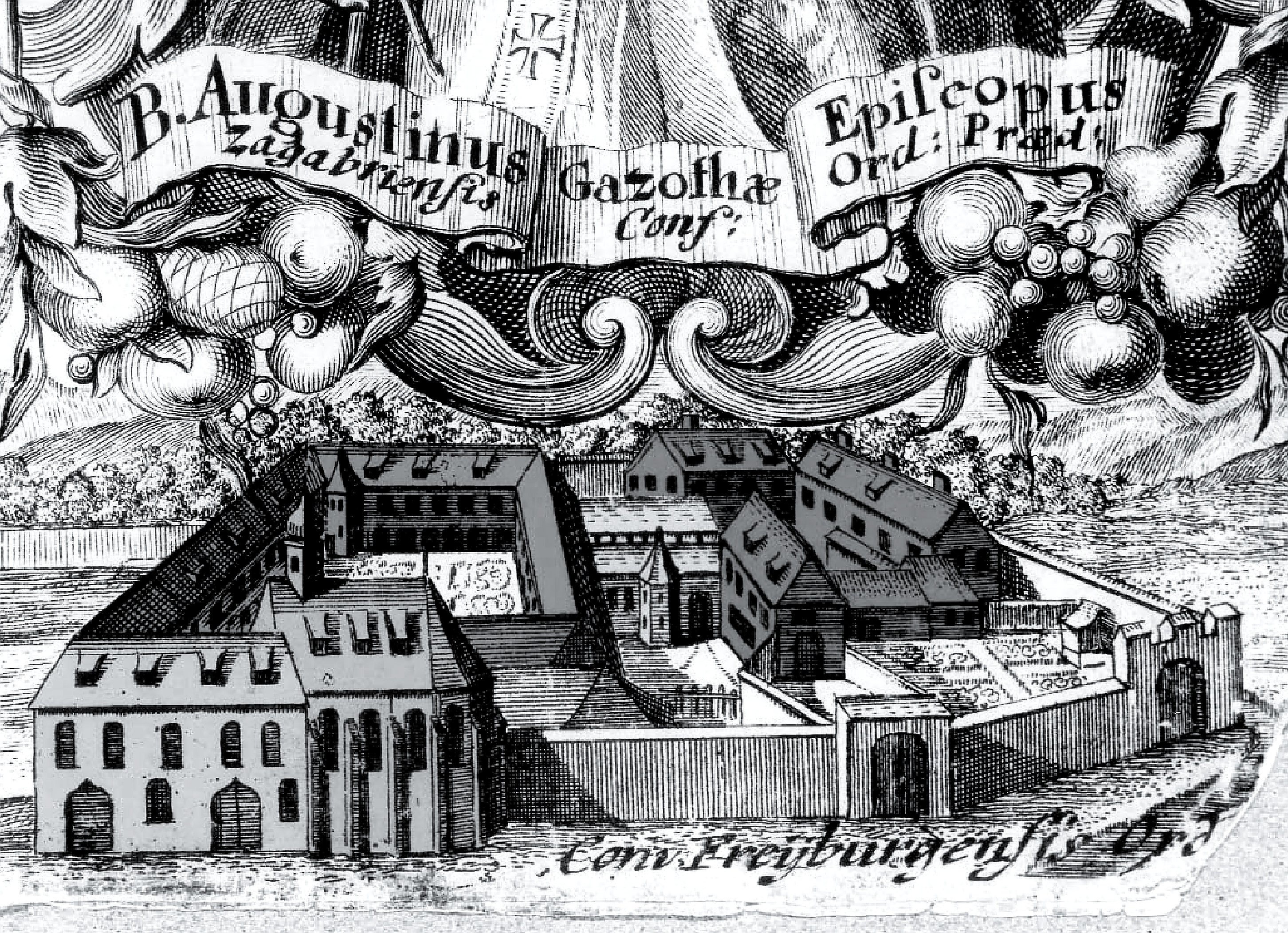 Darstellung des Dominikanerklosters anhand eines Ausschnittes aus einem Andachtsbild aus der ersten Hälfte des 18. Jahrhunderts.